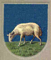 Van Eeghen, familiewapen